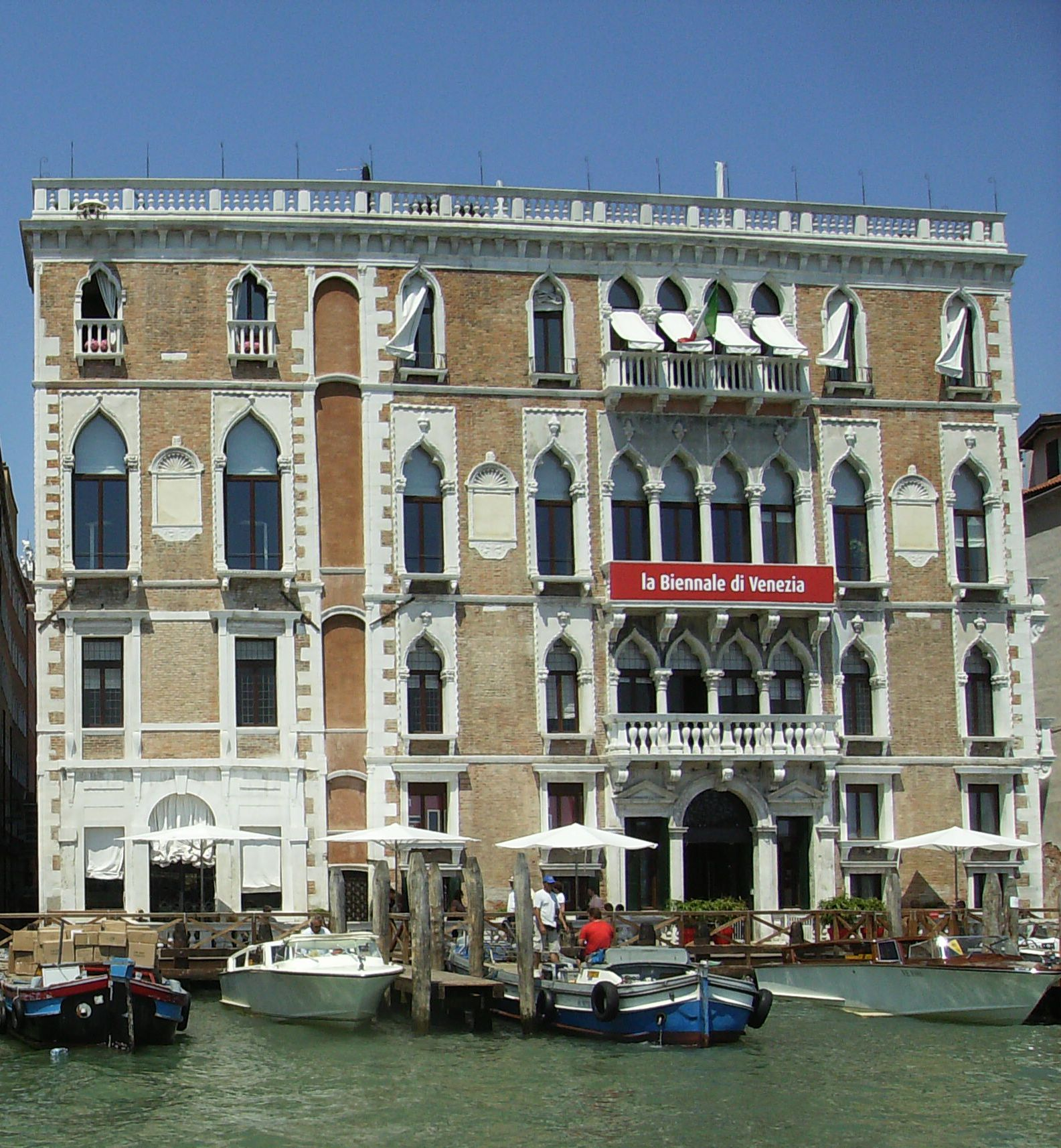 Venise - Palazzo Giustinian